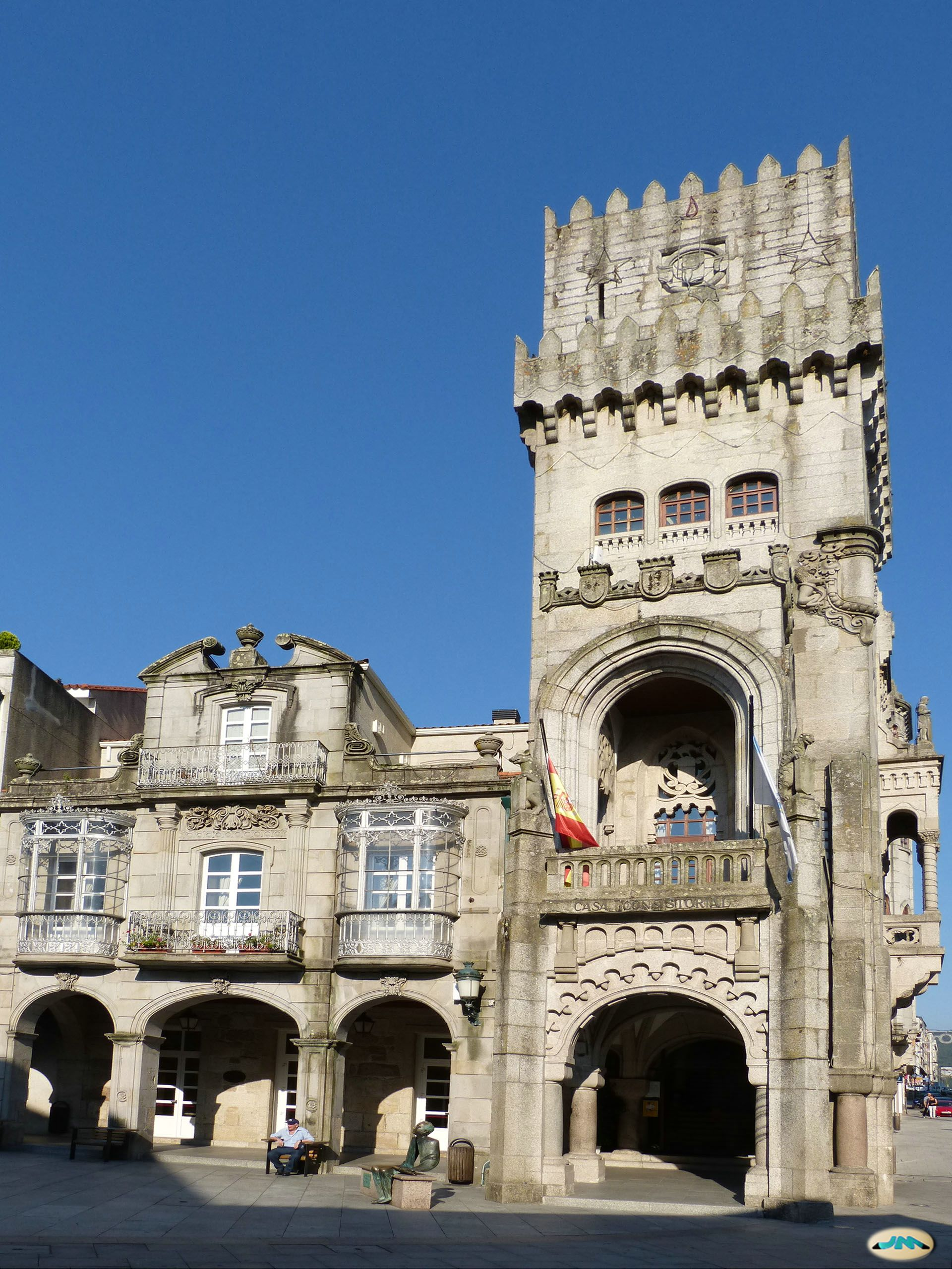 Obra del arquitecto Palacios